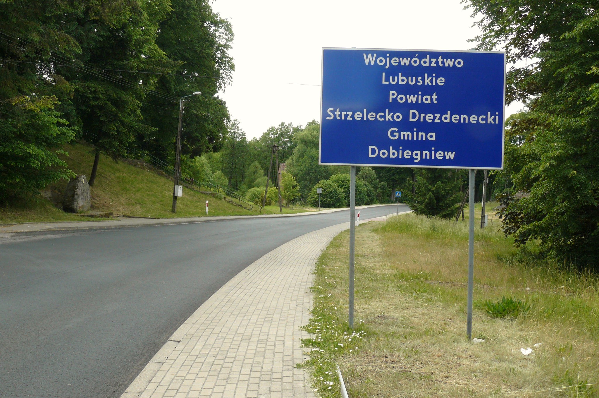 Droga krajowa nr 22 w Starym Osiecznie.